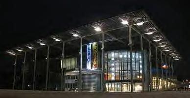 Kunstmuseum Wolfsburg. Kunstmuseum Wolfsburg, 2004